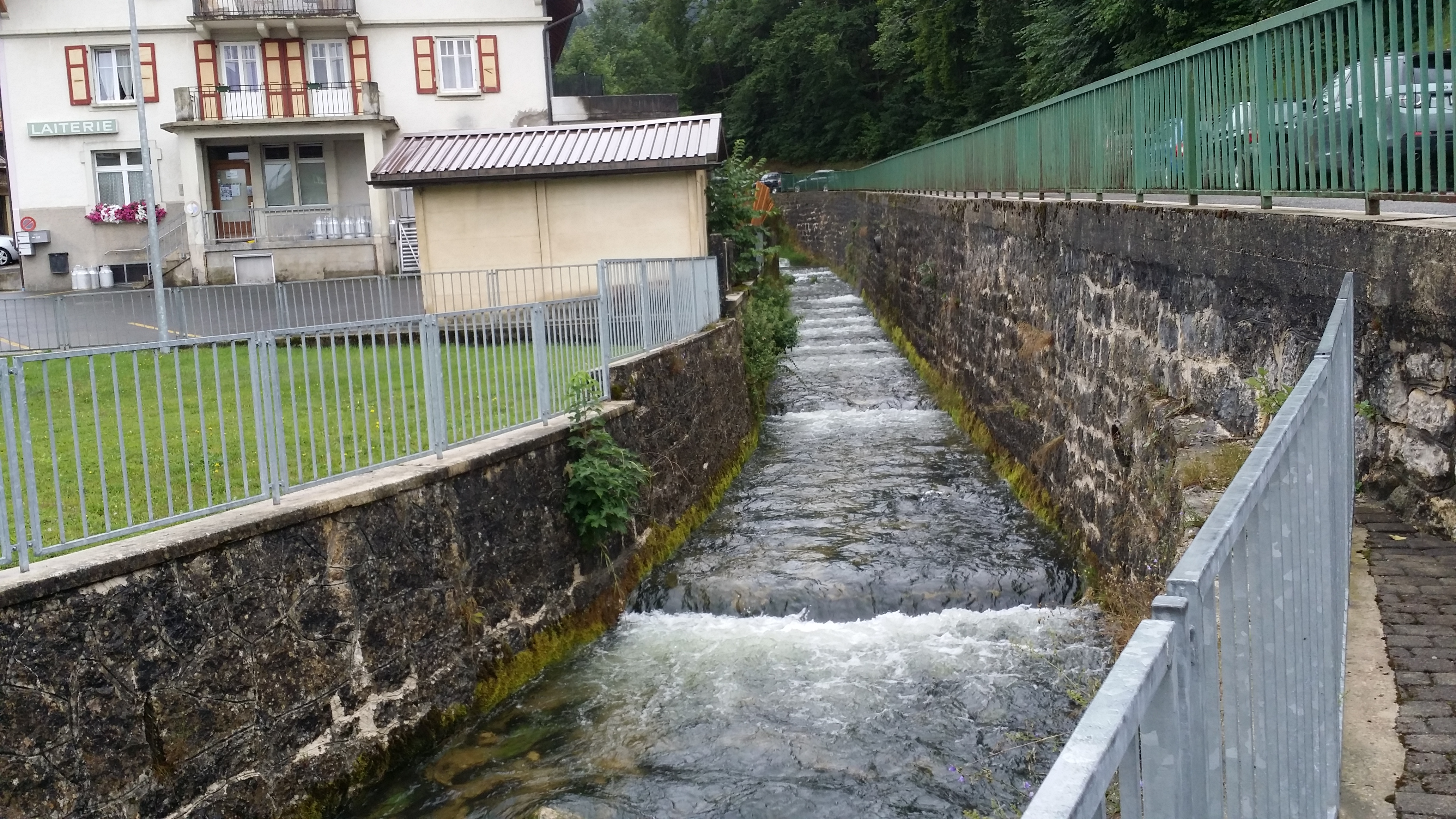 Cours d'eau dans le centre ville du Brassus